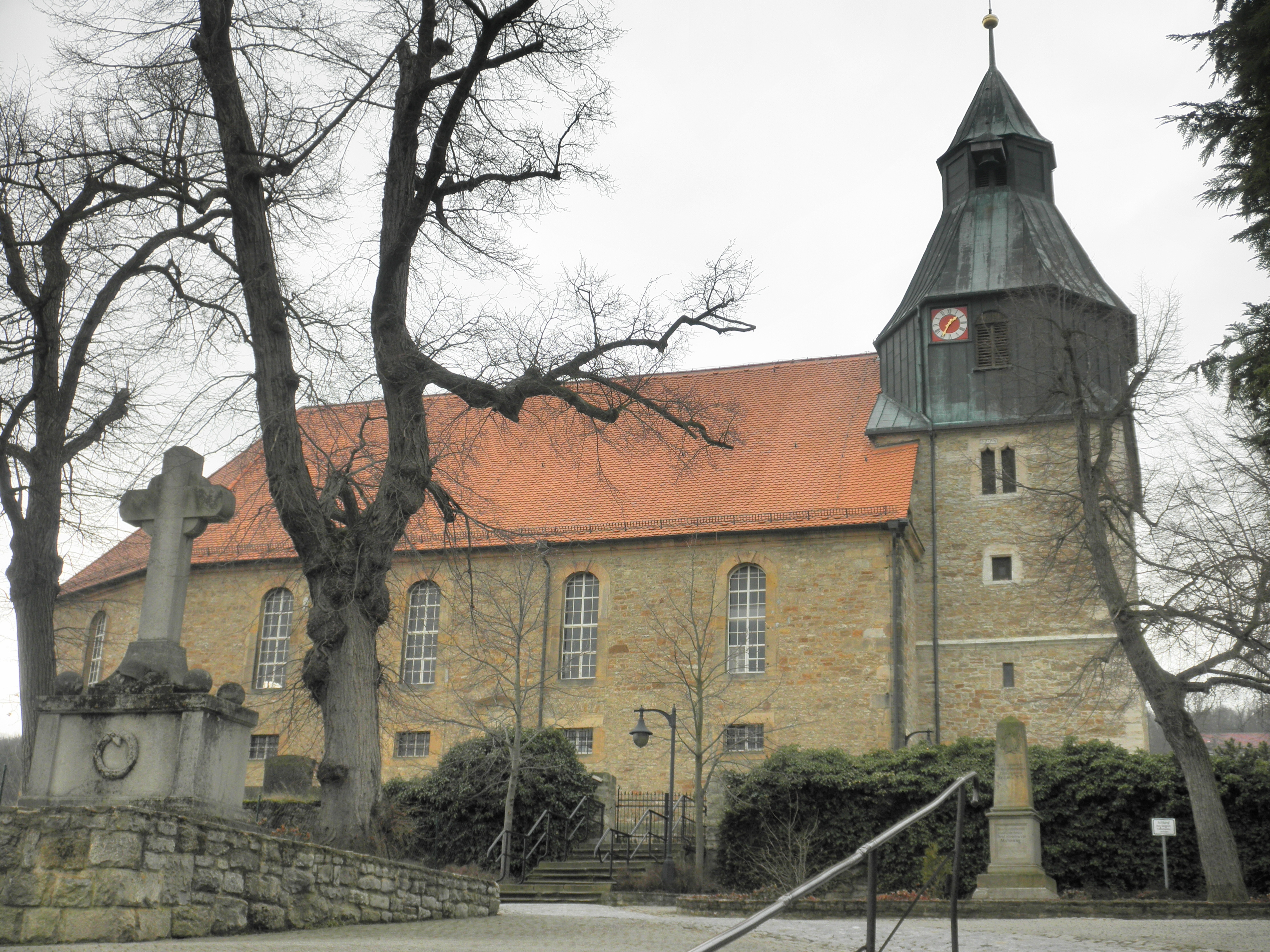 Pfarrkirche St. Martin